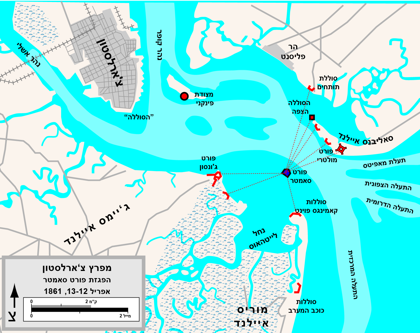 Map of the harbor of Charleston, South Carolina, showing Confederate forts and the bombardment of Fort Sumter, April 1861. Drawn in Adobe Illustrator CS5 by Hal Jespersen. Graphic source file is available at